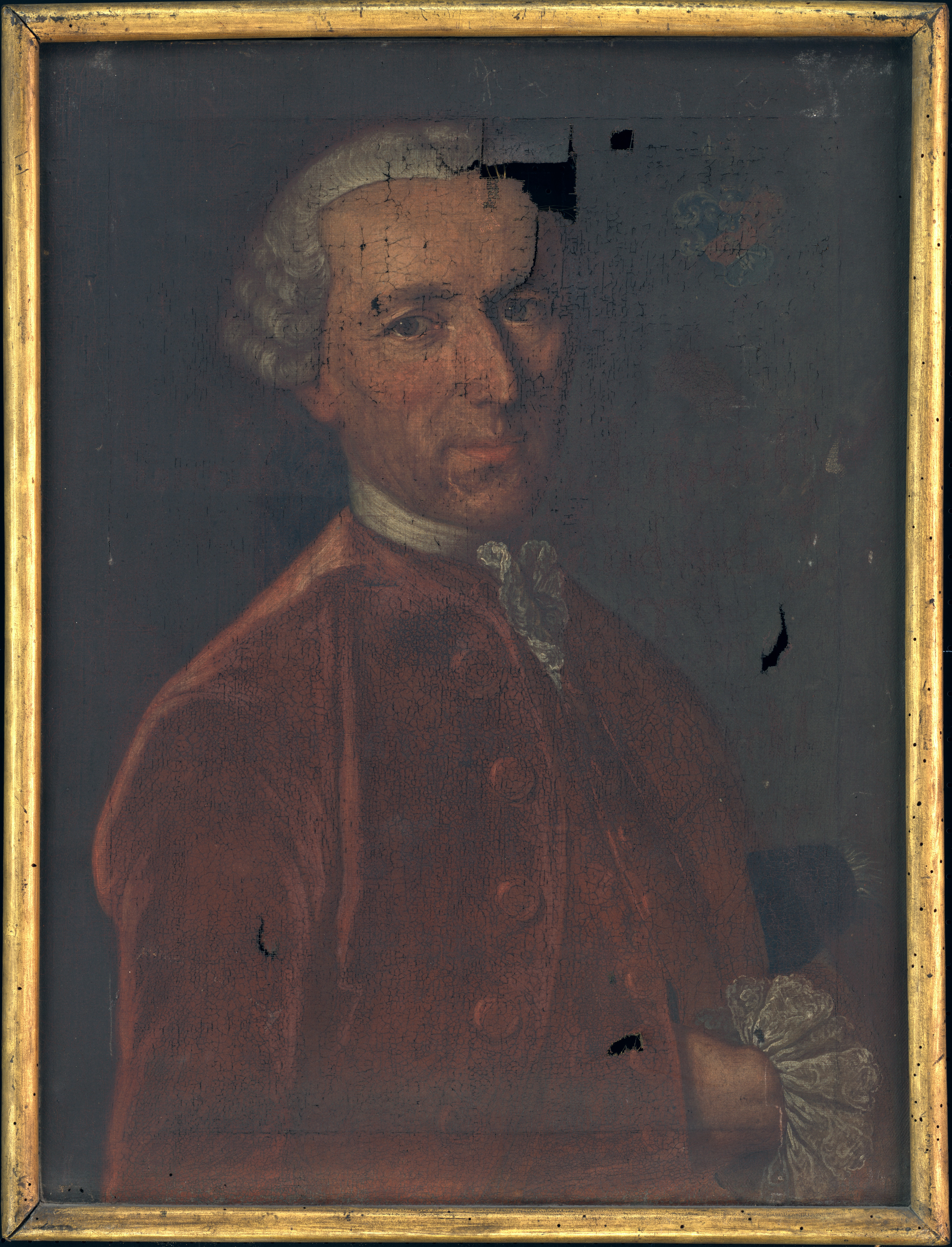 Brustbildnis von Johann Laurenz Zuberbühler (1733–1790) im Alter von 37 Jahren, Öl auf Leinwand, 61 x 46 cm